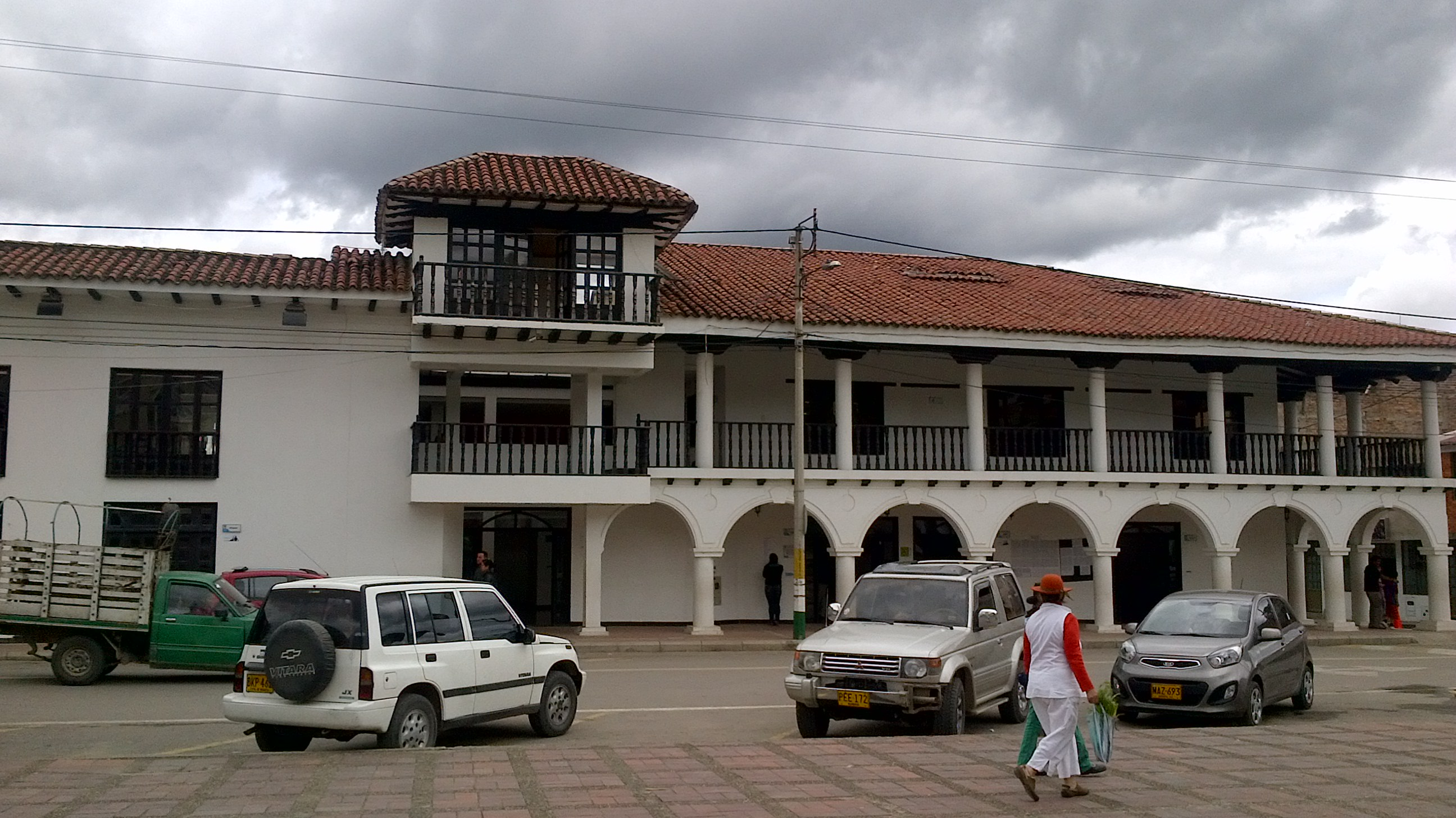 Alcaldia de Belén Boyaca